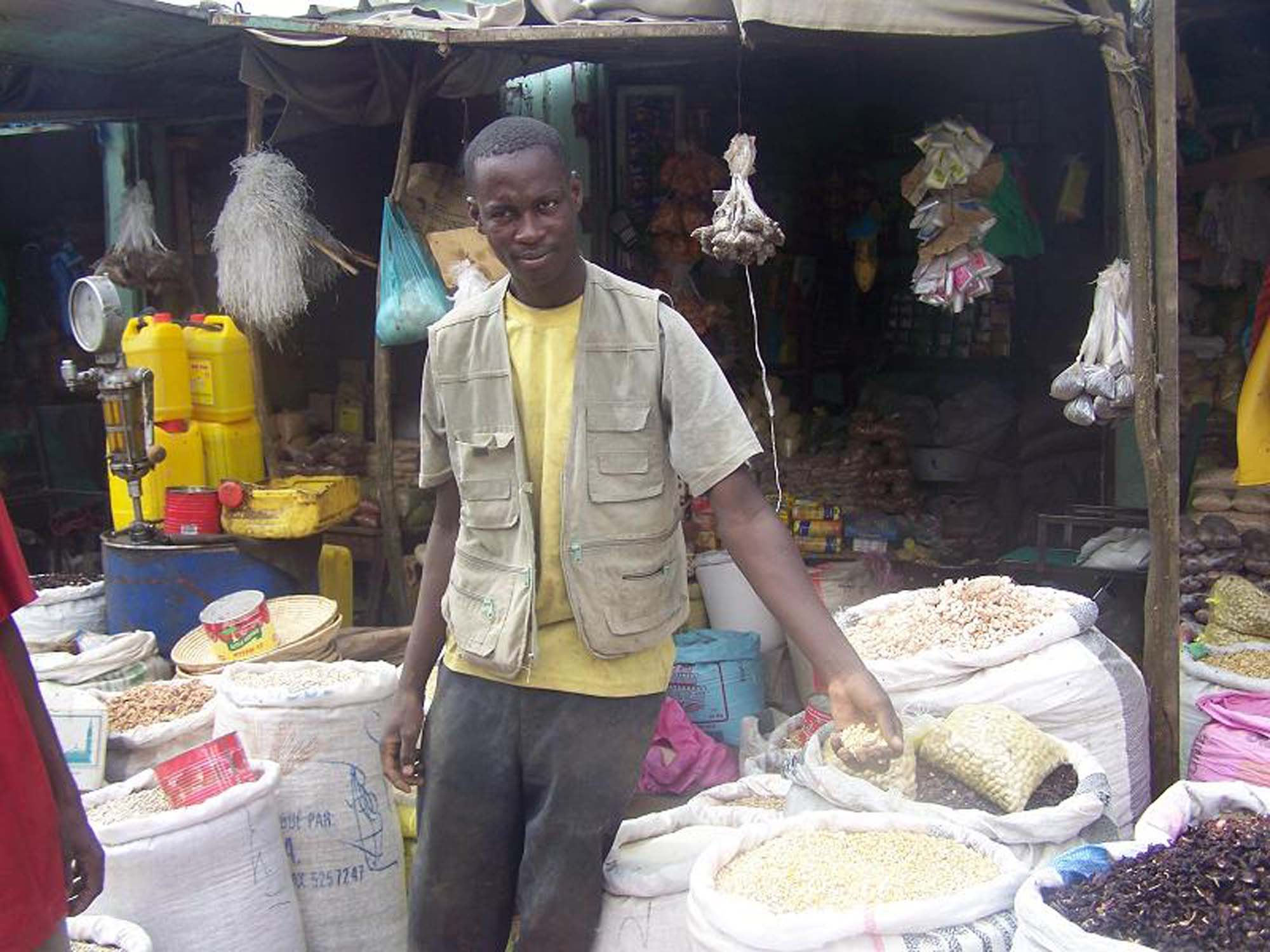 [Jemal Oumar] Grain prices have soared at Mauritanian markets recently due to fears of a future food shortage. ارتفعت مؤخرا أسعار الحبوب بشكل ملحوظ في الأسواق الموريتانية نتيجة مخاوف من حدوث نقص في المواد الغذائية في المستقبل Le prix des céréales est récemment monté en flèche sur les marchés mauritaniens, en raison des craintes liées à une future pénurie alimentaire.